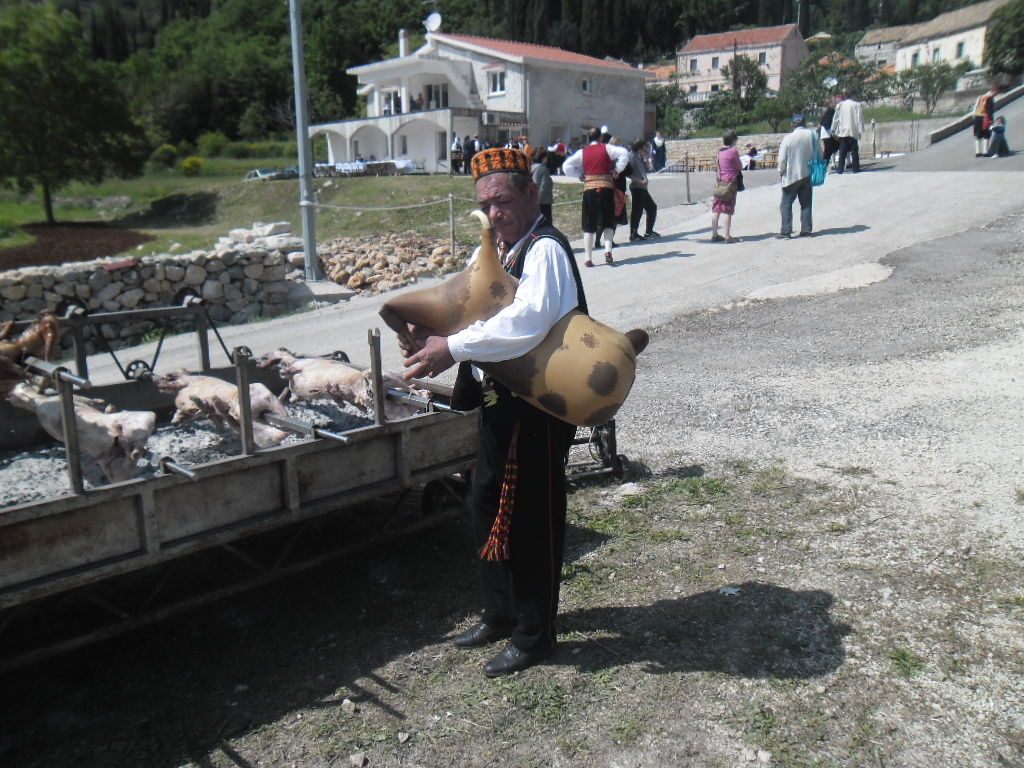 sviranje dipli, selo Ljubač, Dubrovačko primorje, 11. svibnja 2014.